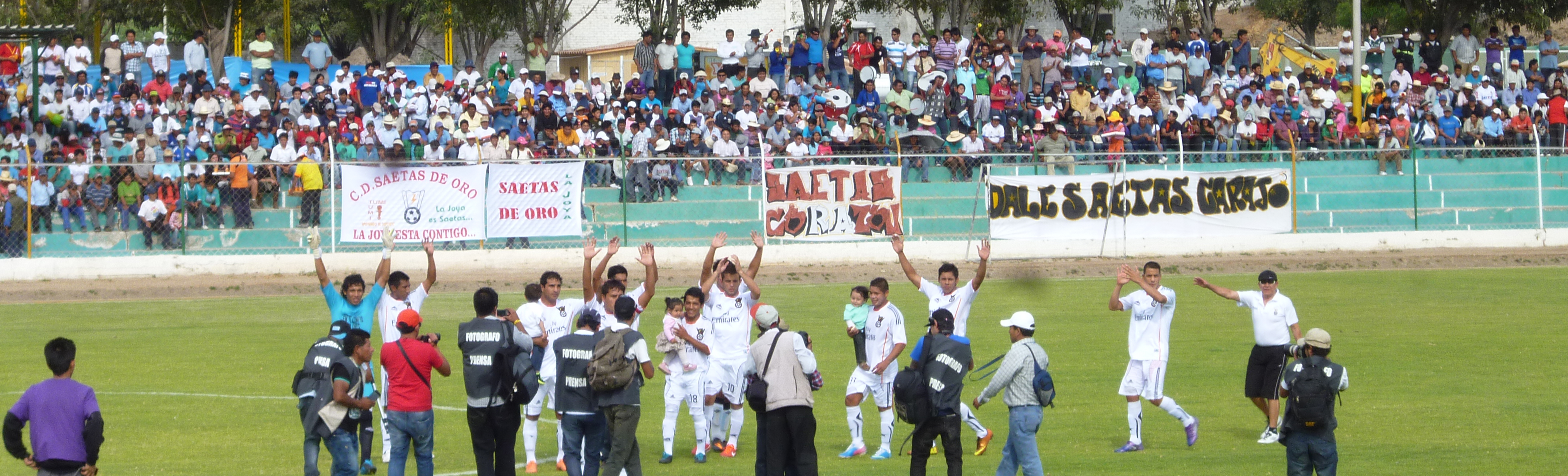 Foto del Saetas de Oro en el Estadio Municipal de La Joya